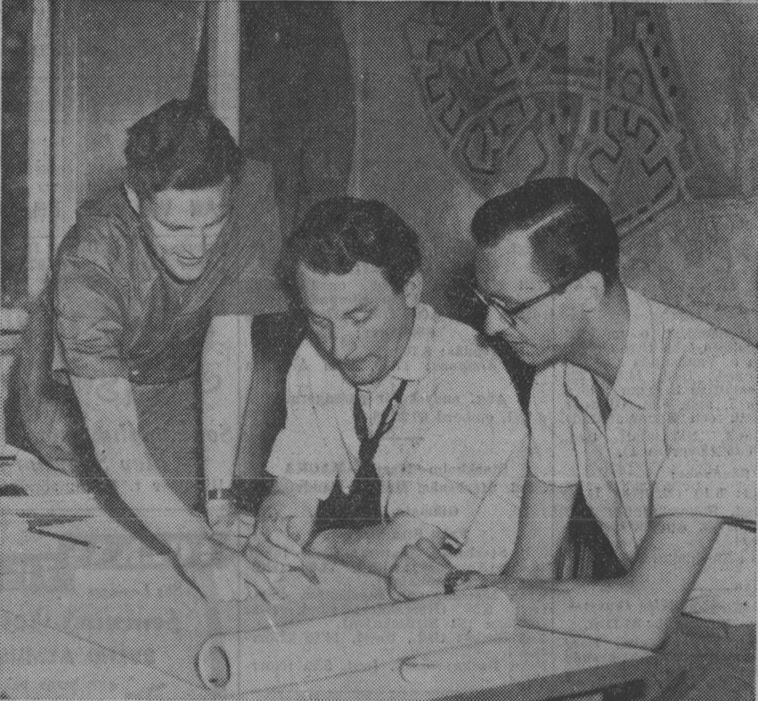 Josef Stäck, Hans Fries och Dag Åberg på Stockholms stadsbyggnadskontor med plan över Hässelby gård